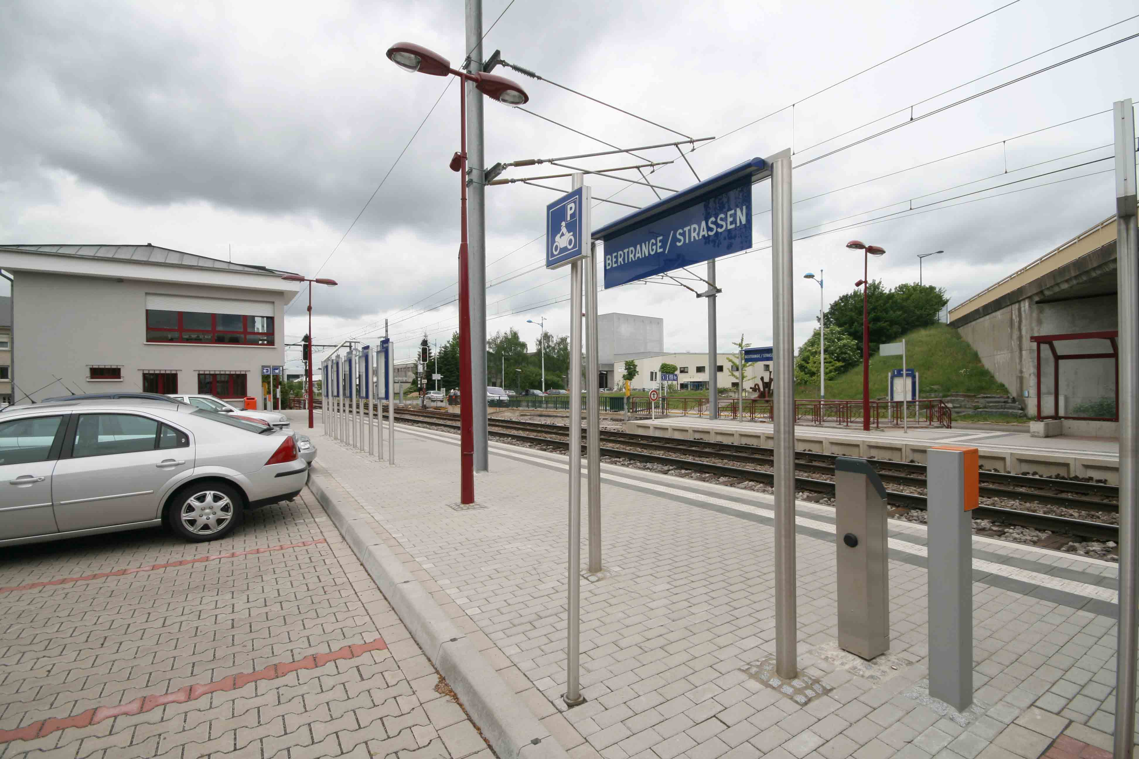 Gare Bartreng-Stroossen.